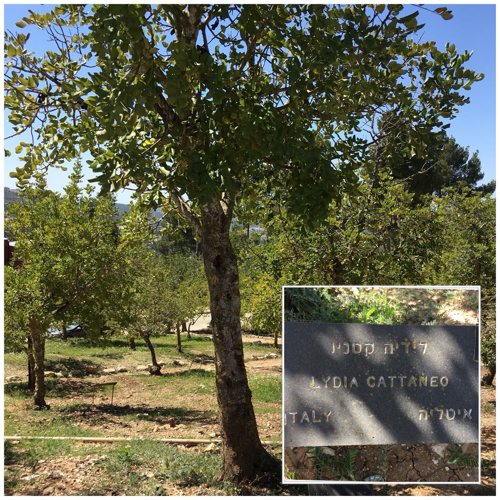 עץ הכבוד בגן יד ושם למעשיה של לידיה קטנאו, חסידת אומות עולם